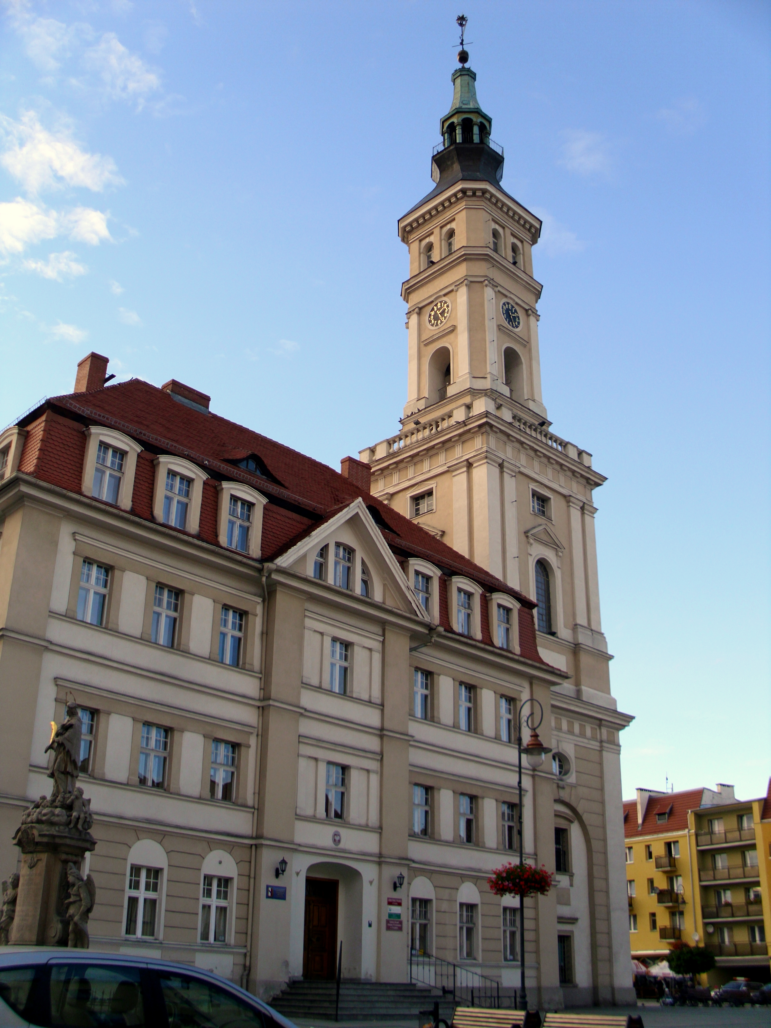 Prudnik, ratusz (XVIII w., 1840) 10.1958.